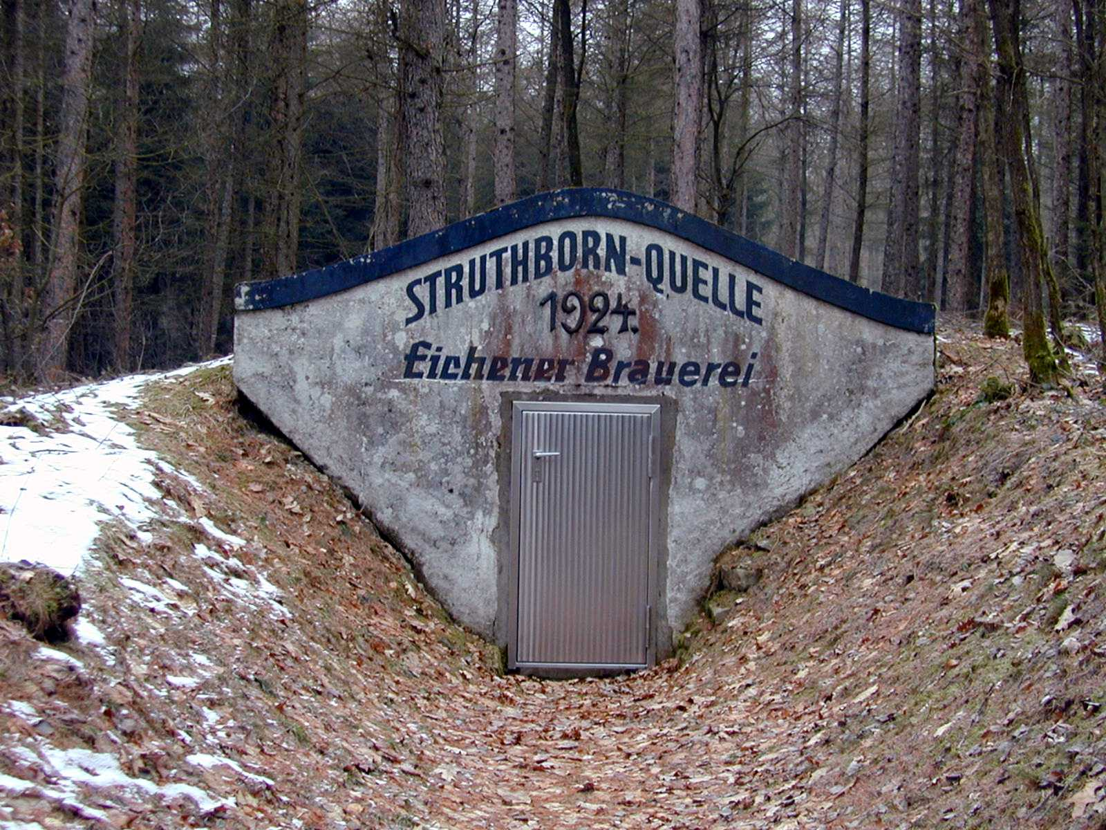 Eingang der Struthbornquelle, Kreuztal-Eichen